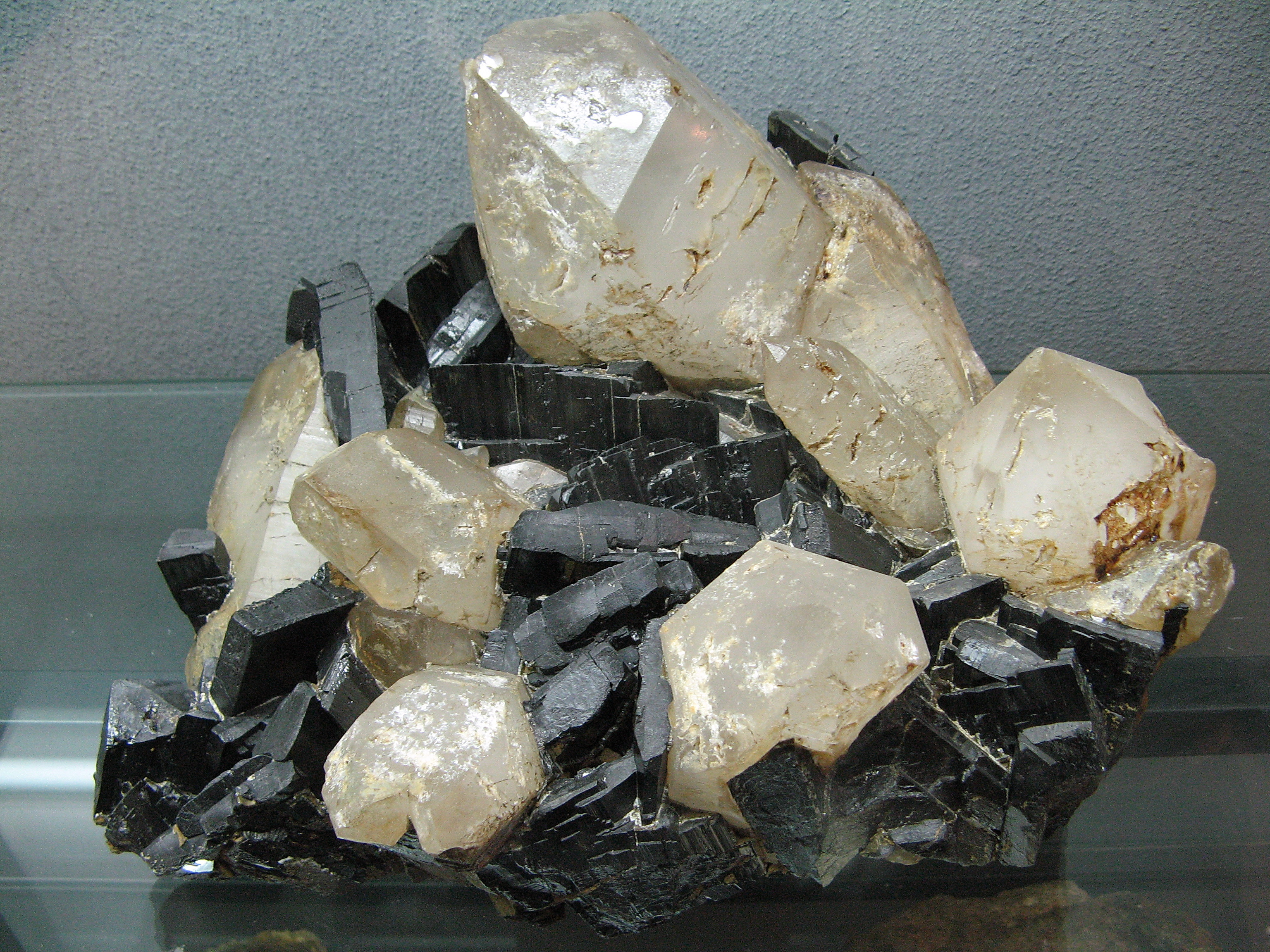 Quartzo em volframite